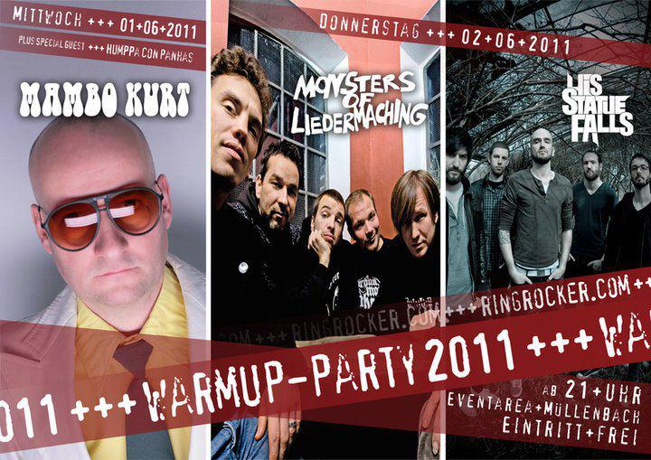 Flyer der ringrocker WarmUp Party 2011